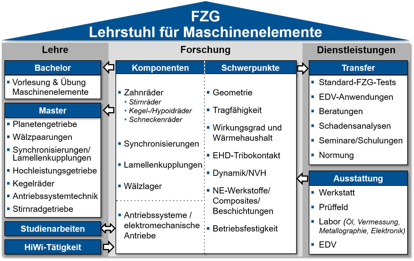 Überblick über die Forschungsinhalte und -tätigkeiten an der FZG